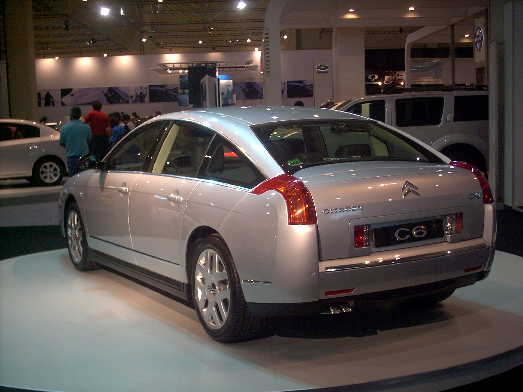 Citroen C6 3.0 2006